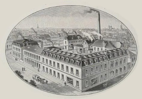 Klavierbauunternehmen Gebrüder Knake AG, Münster (Westfalen), Grevener Straße 165-167 (Anzeige vom 5. September 1907)